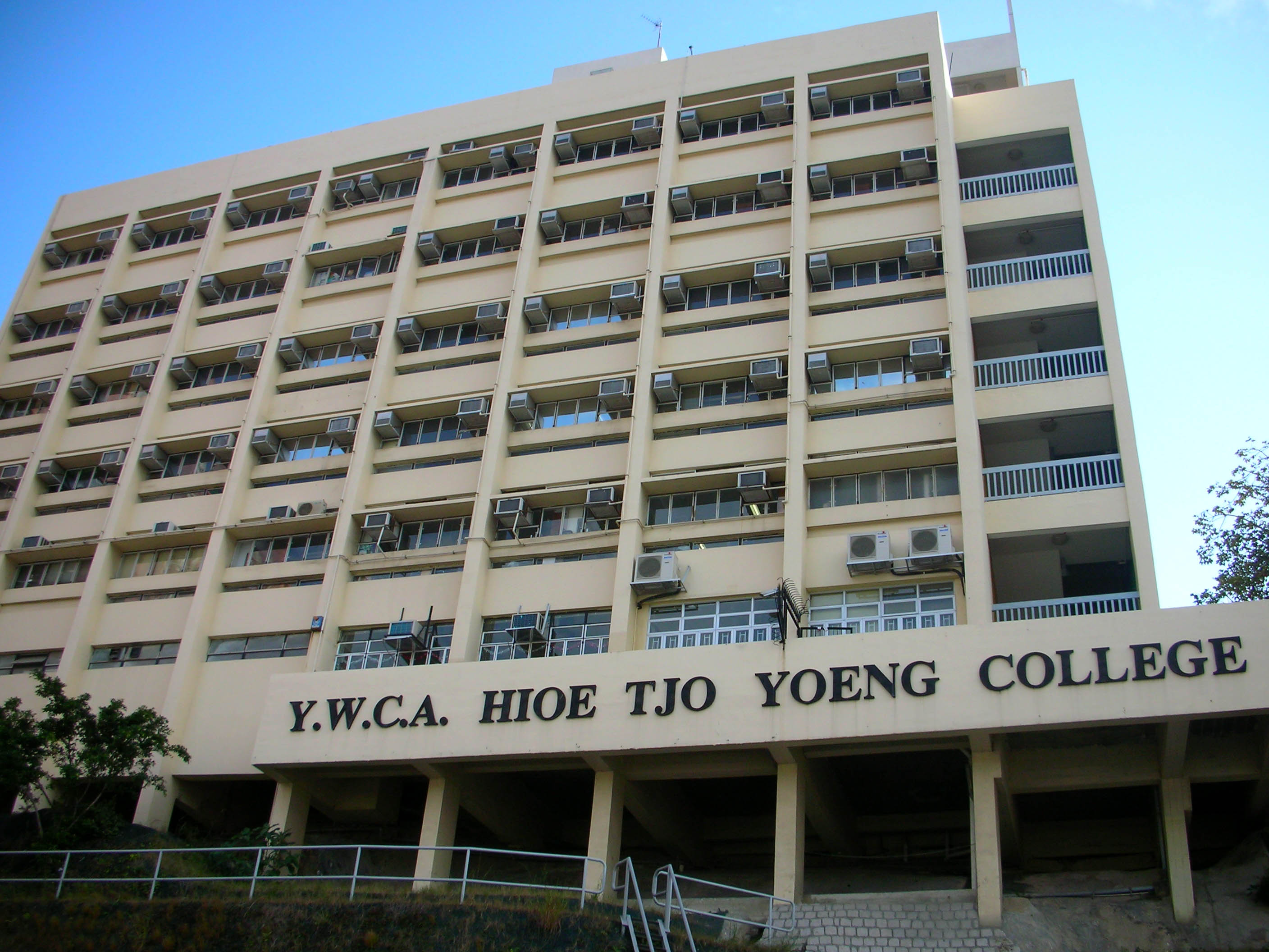 Y.W.C.A. Hioe Tjo Yoeng College, Ho Man Tin, Hong Kong 基督教女青年會丘佐榮中學，位於香港何文田。